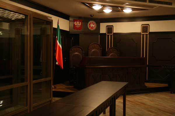 Фотографии Верховного Суда РТ. Зал рассмотрения уголовных дел. Расположен на 2-м этаже Атриума.